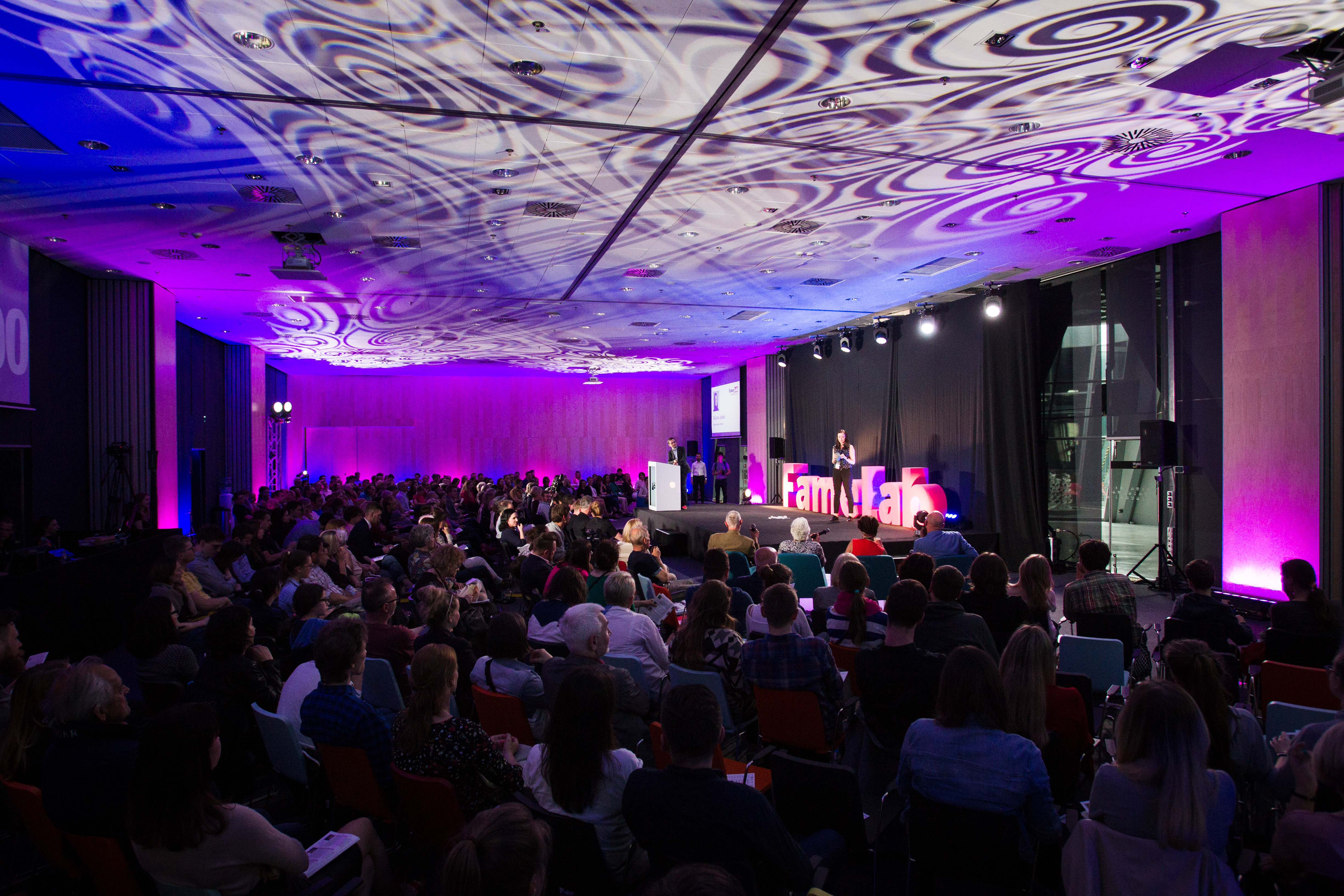 FAMELAB 2018 - FINAŁY, CENTRUM NAUKI KOPERNIK